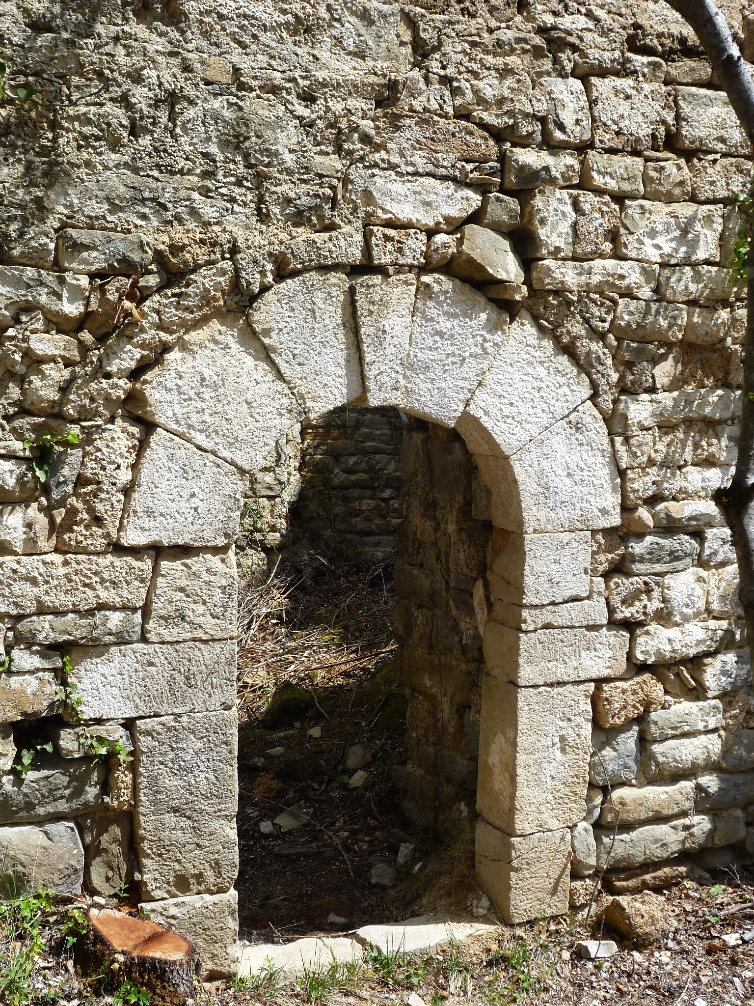 Església de Sant Andreu del Pujol del Racó (la Coma i la Pedra): portal